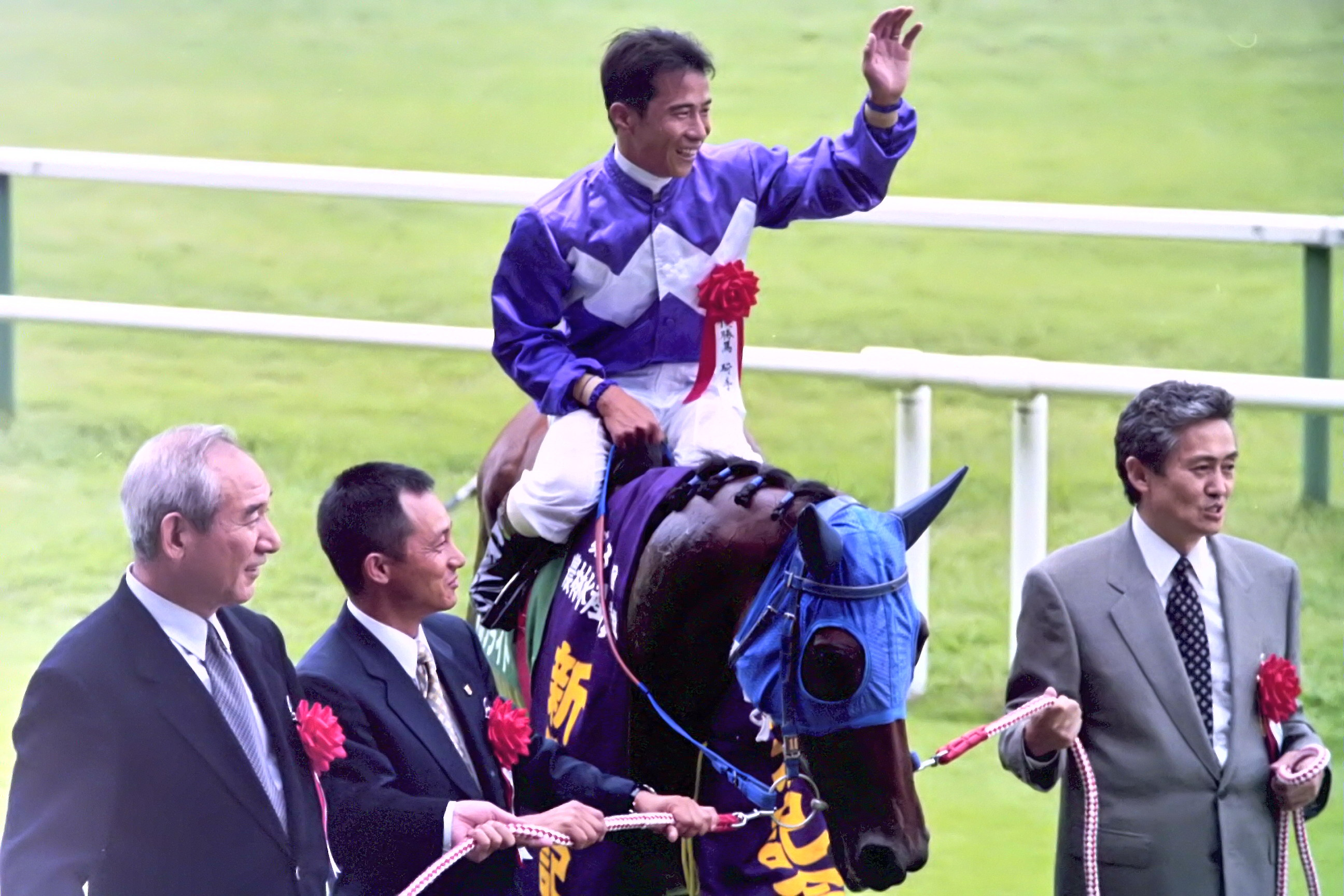 パルブライト 1997年新潟記念